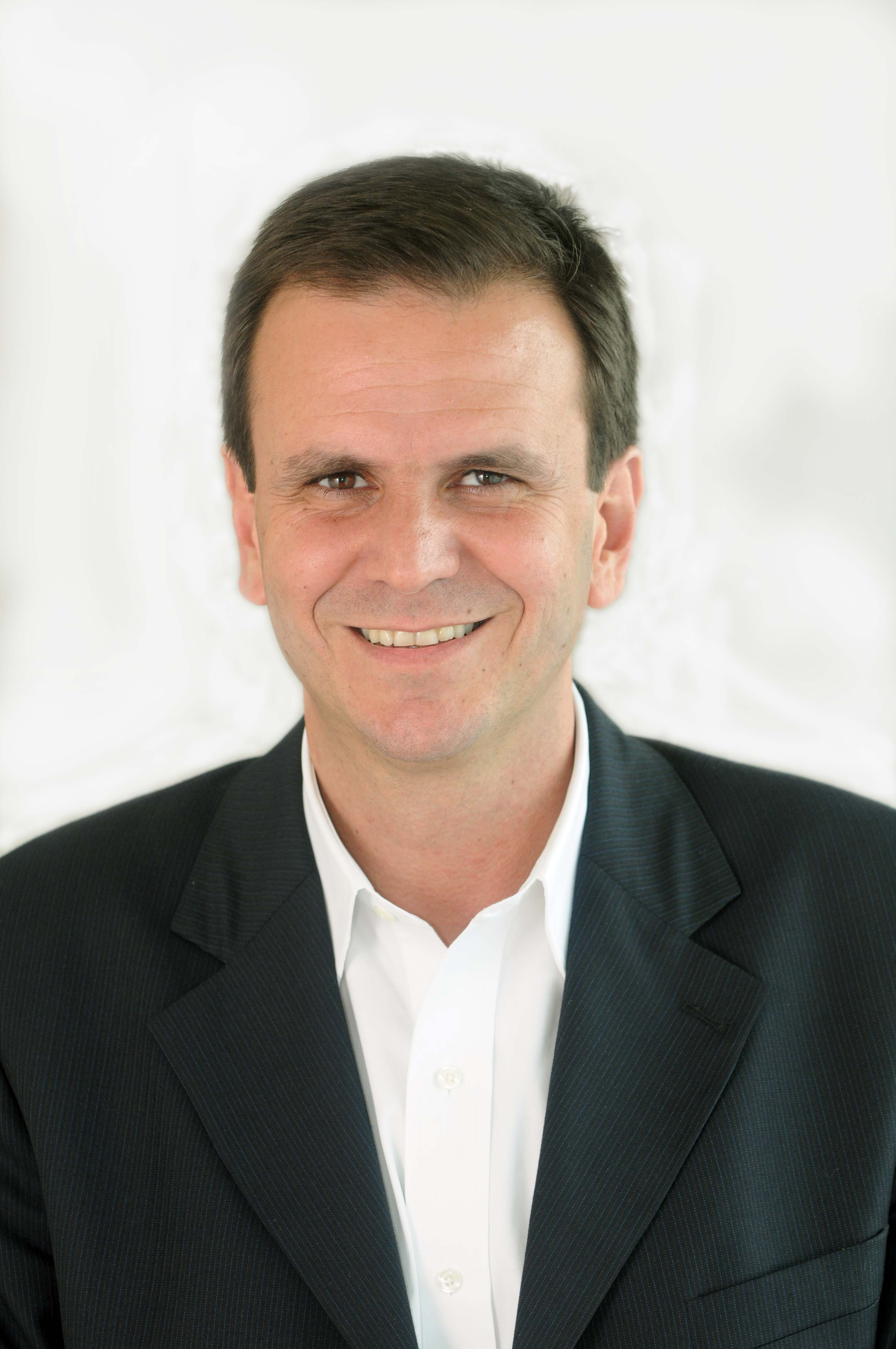 Foto oficial de Eduardo Paes, prefeito do Rio de Janeiro.